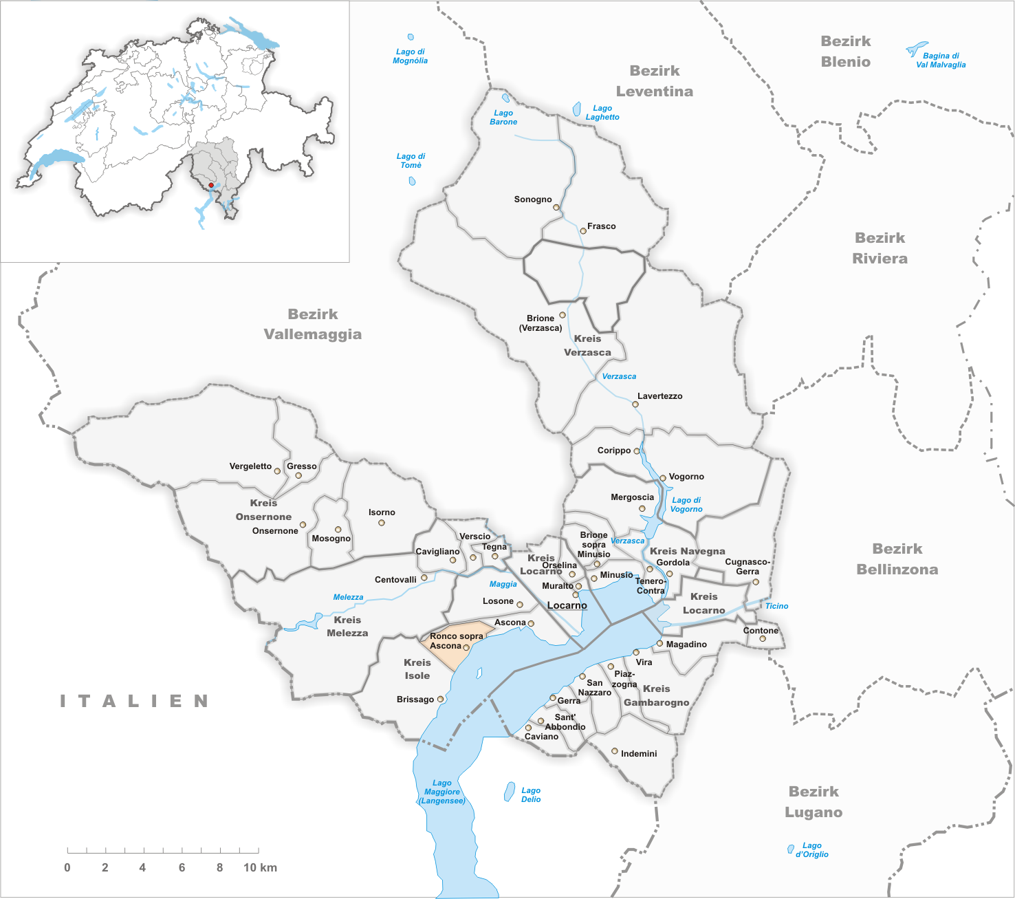 Municipality Ronco sopra Ascona Artist: Tschubby